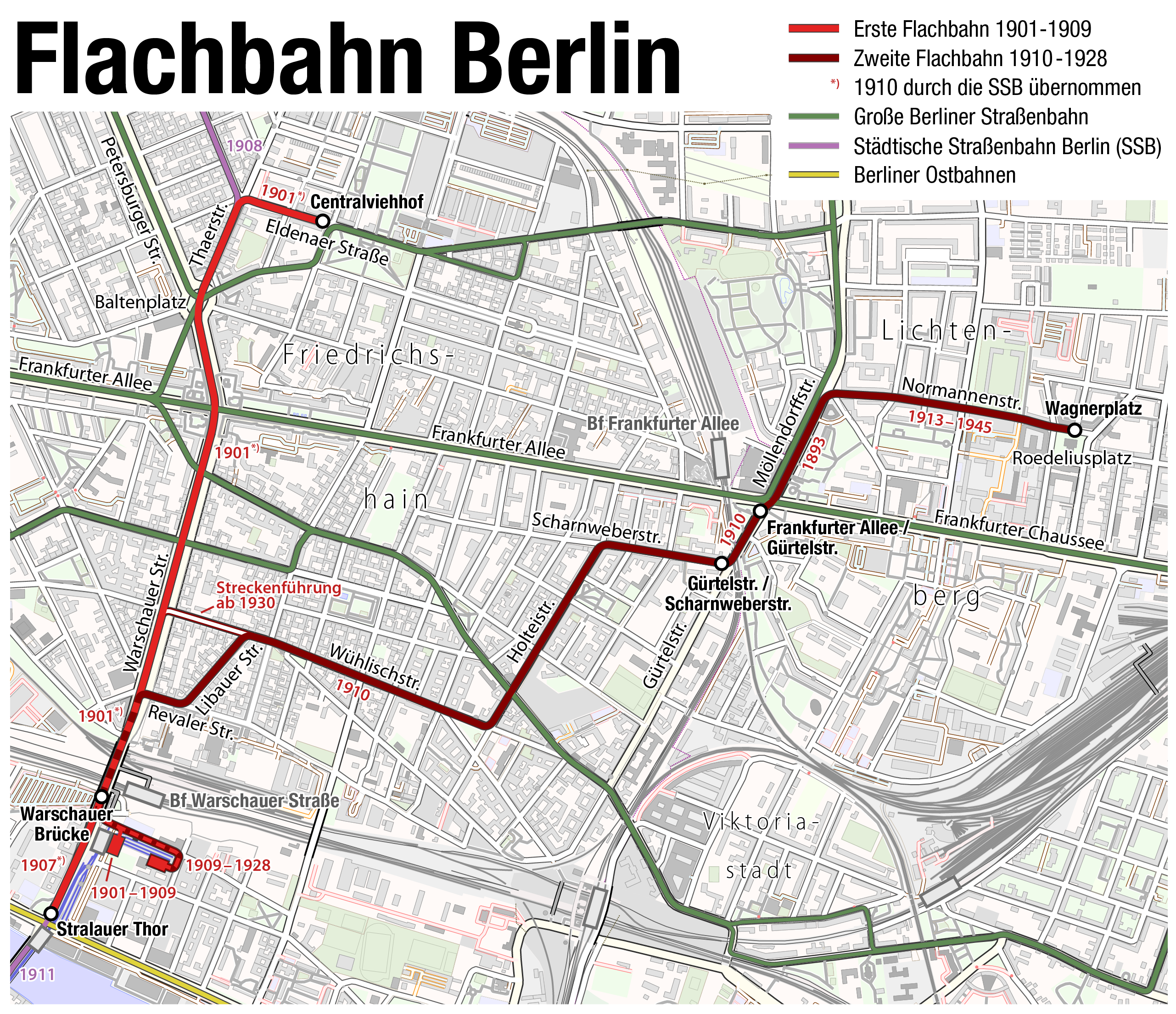 Karte der Flachbahn in Berlin (1901-1928)